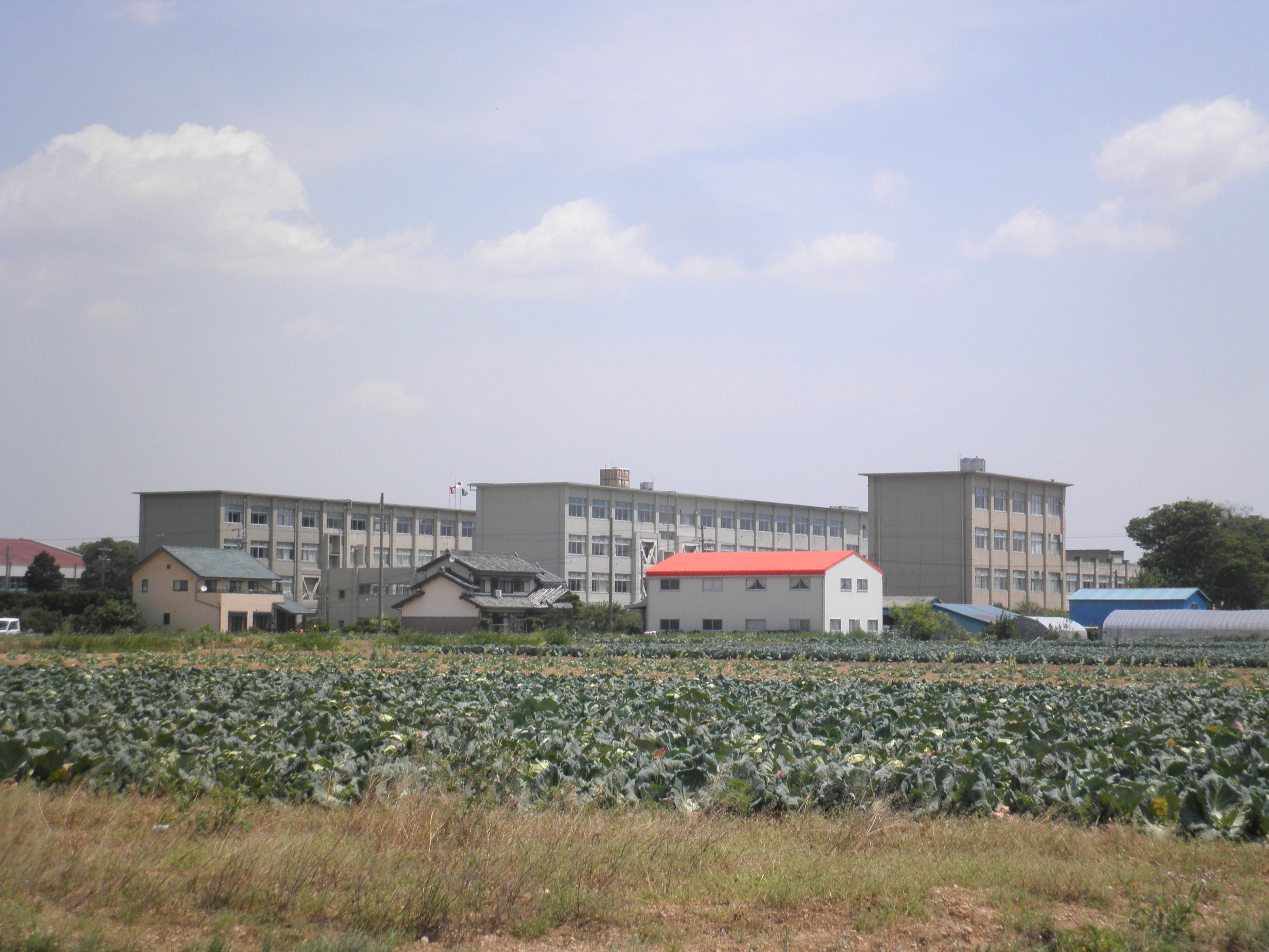 愛知県豊橋市にある県立豊橋南高校